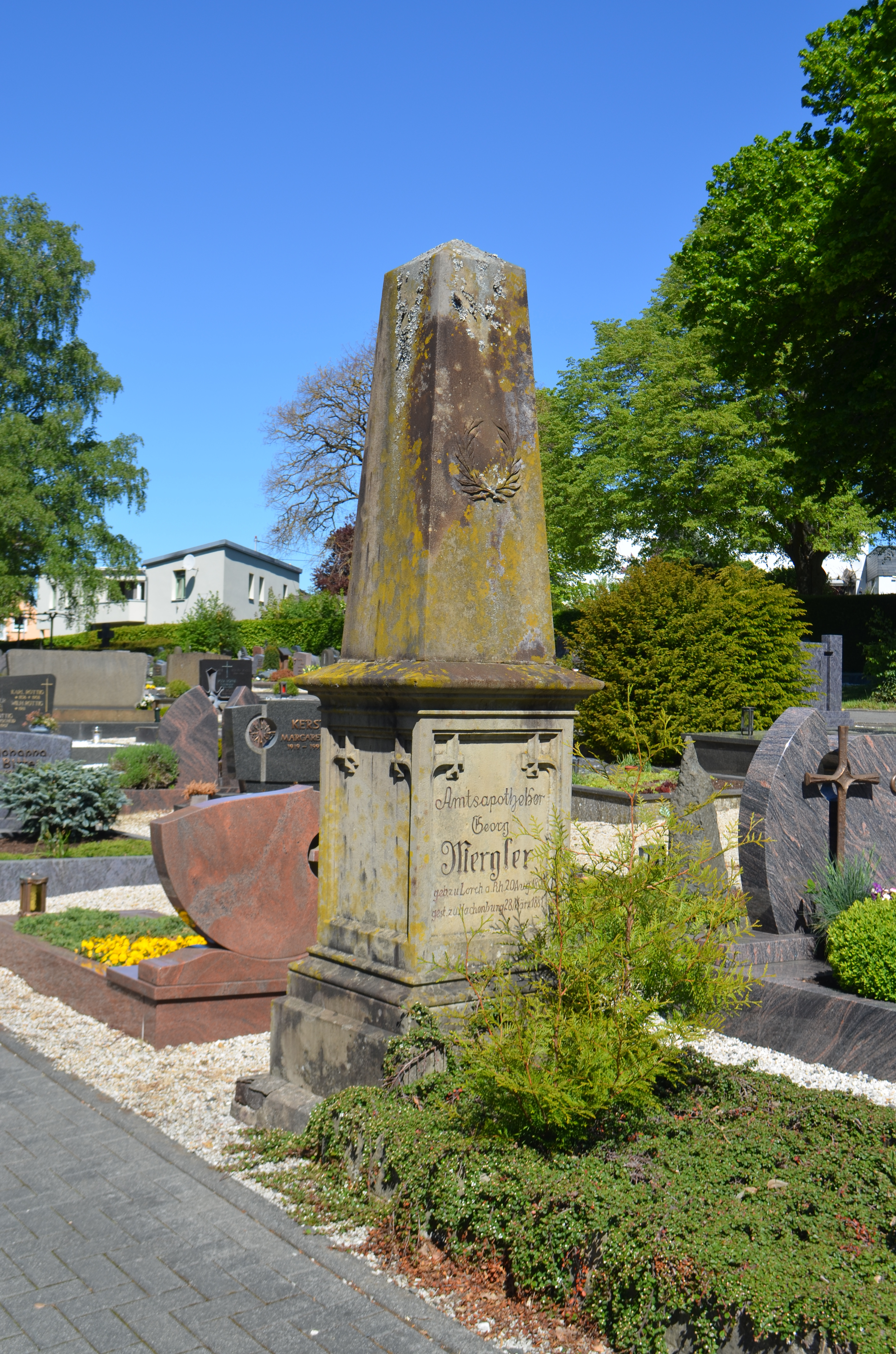 Hachenburg, Friedhof Steinweg, Grab Amtsapotheker Georg Mergler